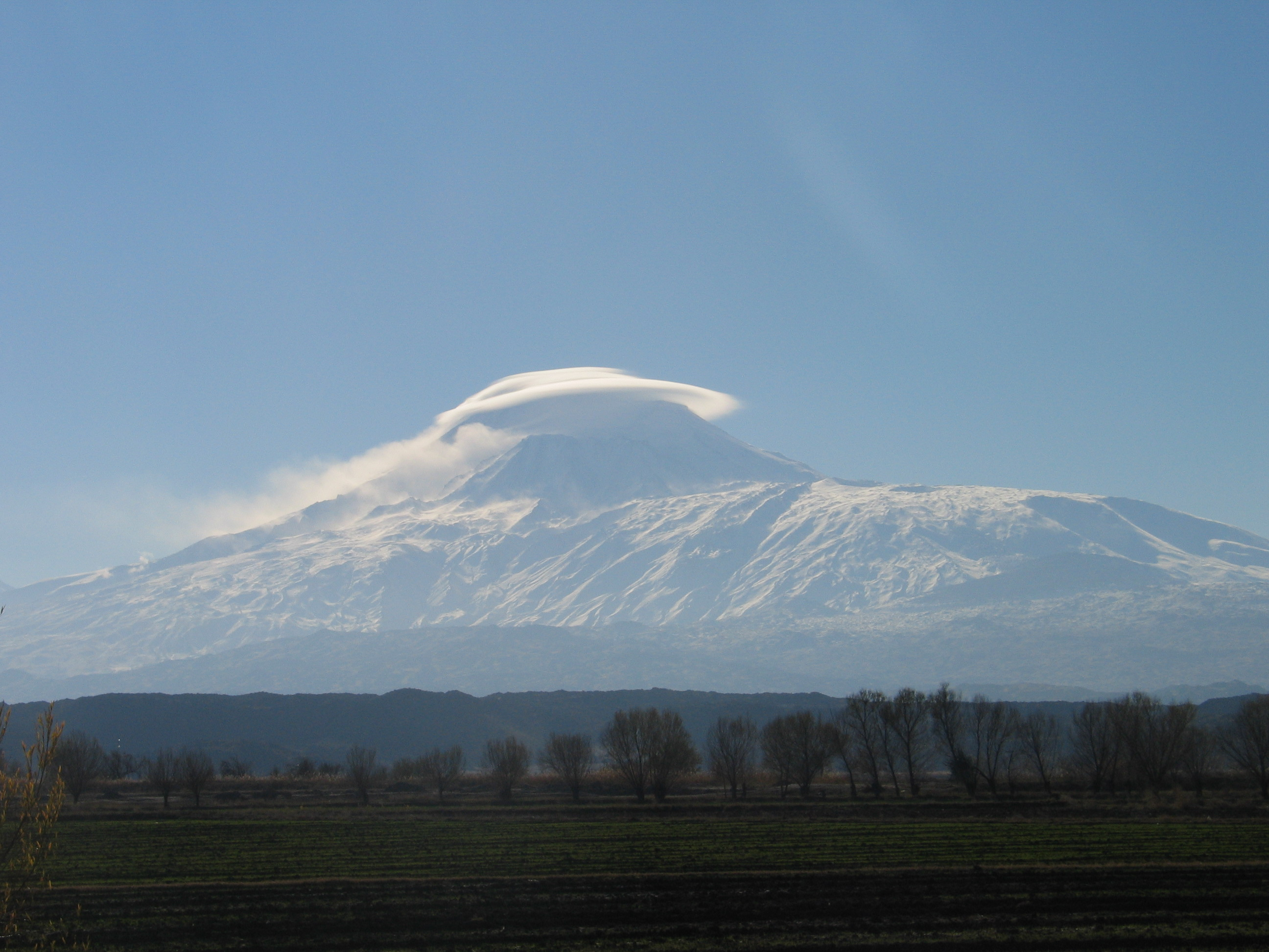 Fotoğraf Aralık-Iğdır karayolu üzerinden çekilmiştir. Fotoğrafta Ağrı Dağı üzerinde sis bulutundan şapka şeklinde bir hale görülmektedir.